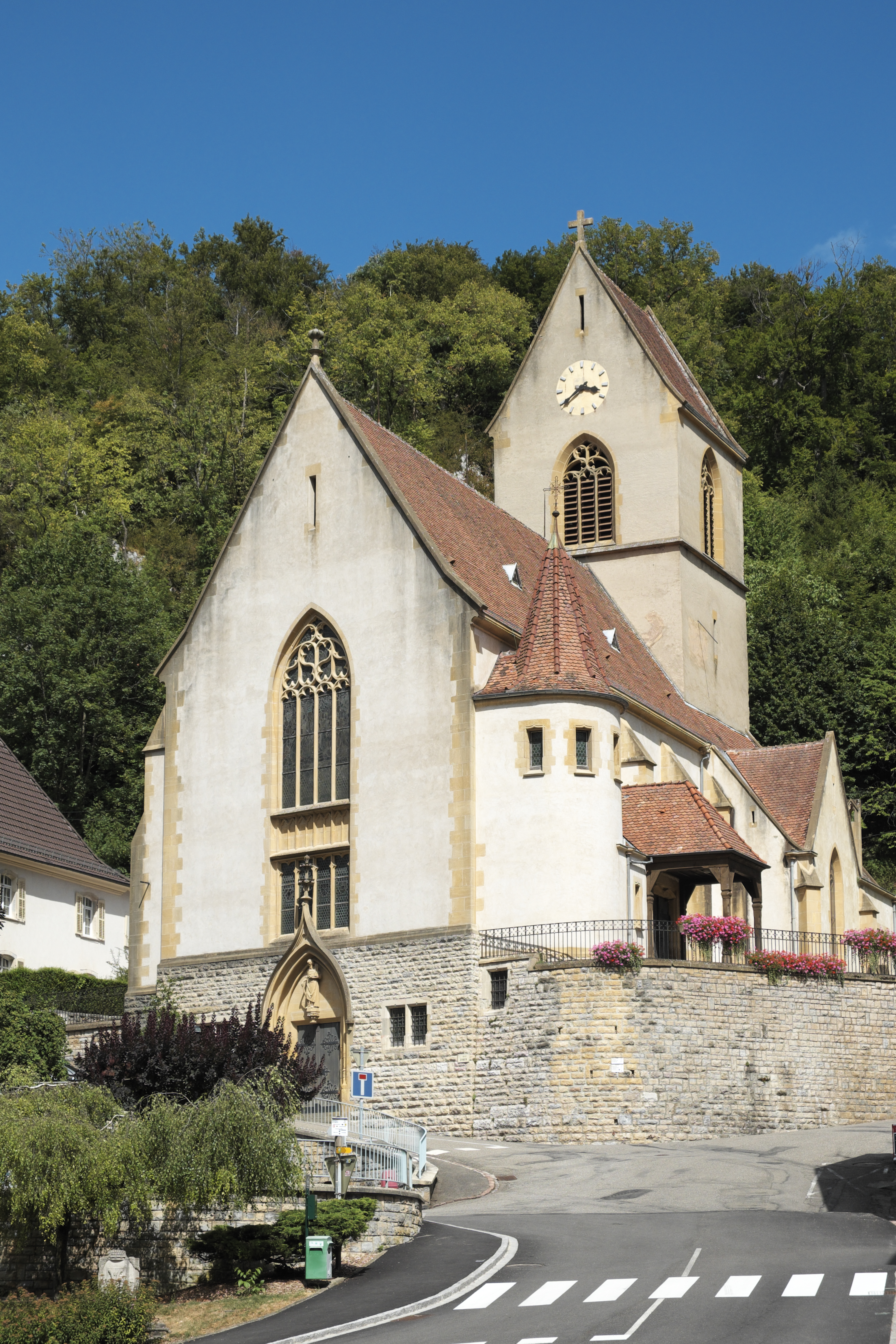 Kirche Saint-Bernard de Menthon in Ferrette (Pfirt) im Département Haut-Rhin (Elsass/Frankreich)